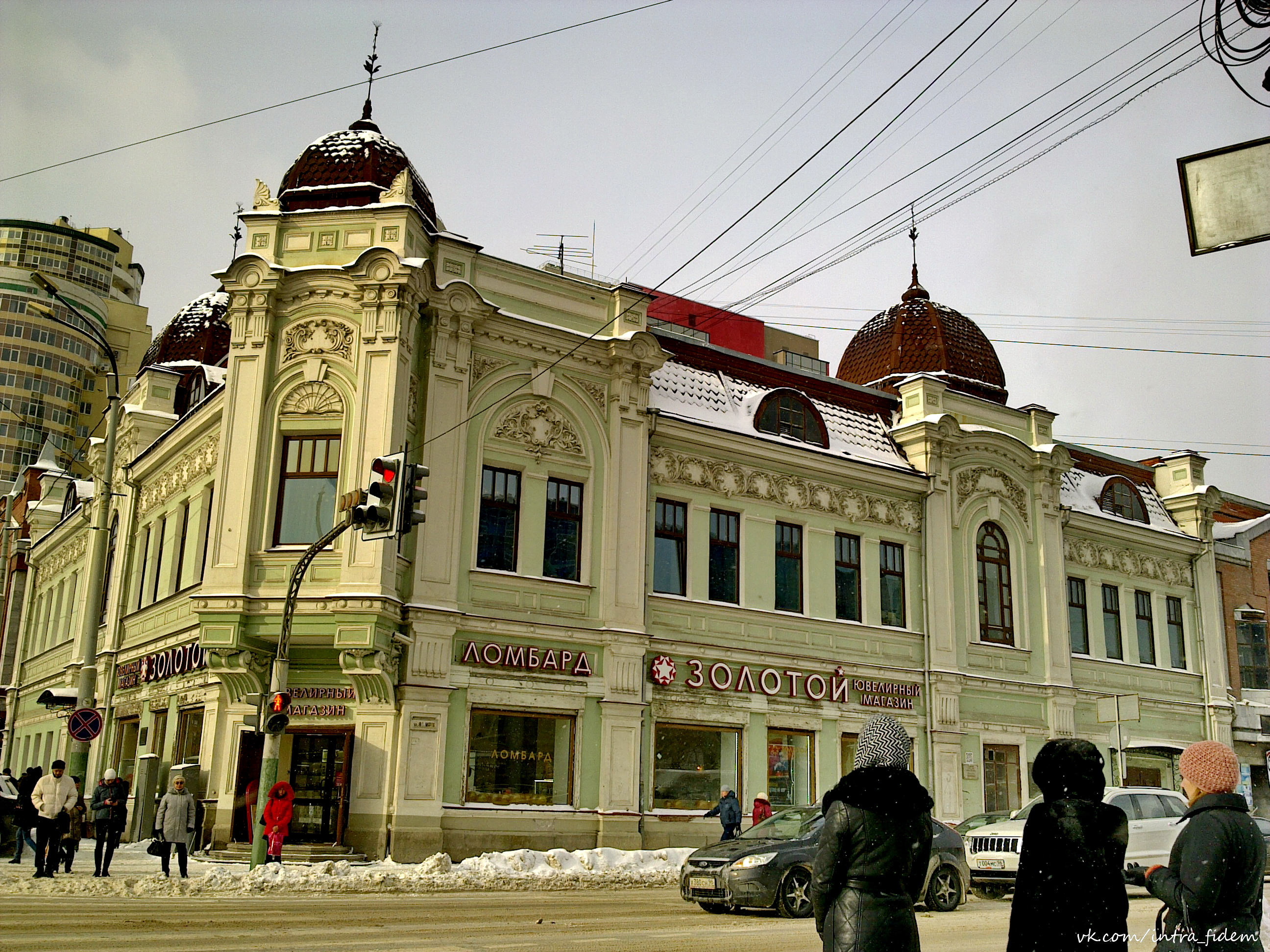 Доходный дом купца Е.И. Первушина (здание казначейства) (Свердловская область, Екатеринбург, улица 8 Марта, 28)